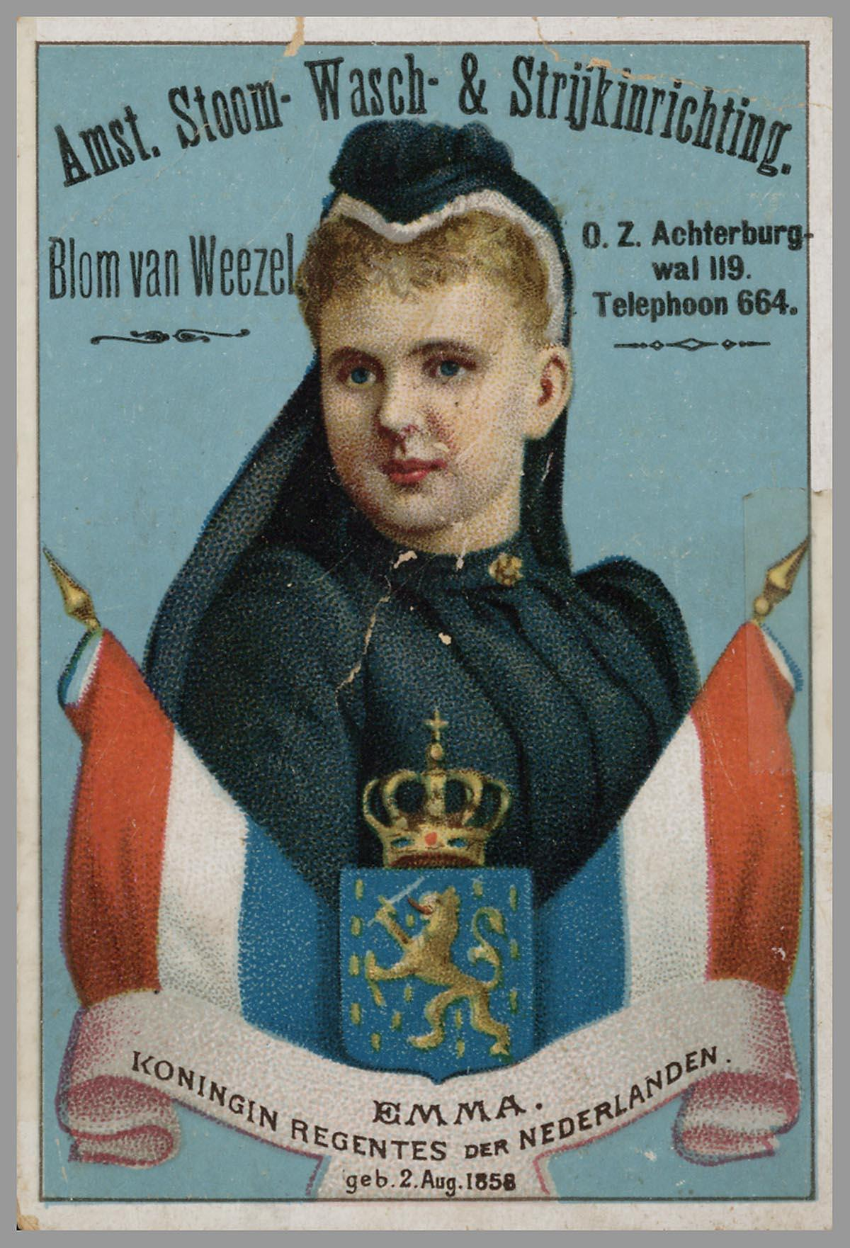 Reclamekaart: Amst. Stoom- Wasch- & Strijkinrichting Blom van Weezel . Drukker: J.C.F. Veenman. Opdrachtgever/adverteerder: Amsterdamsche Stoom, Wasch- en Strijkinrichting Blom van Weezel.